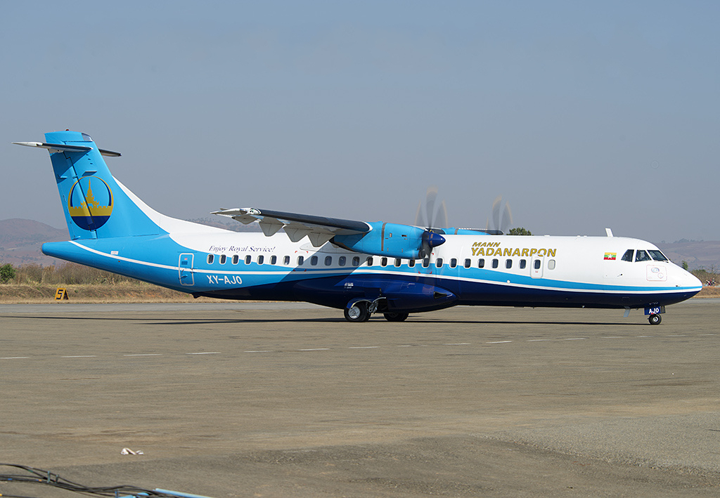 XY-AJO (cn 1127) Delivery on 28/01/2014